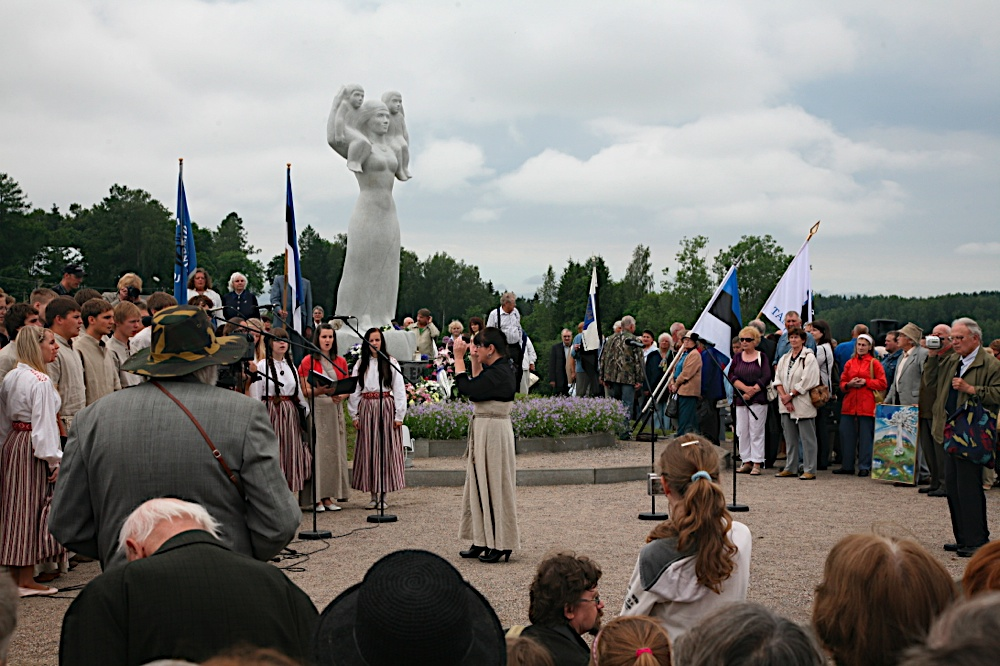 Eesti Ema avamine